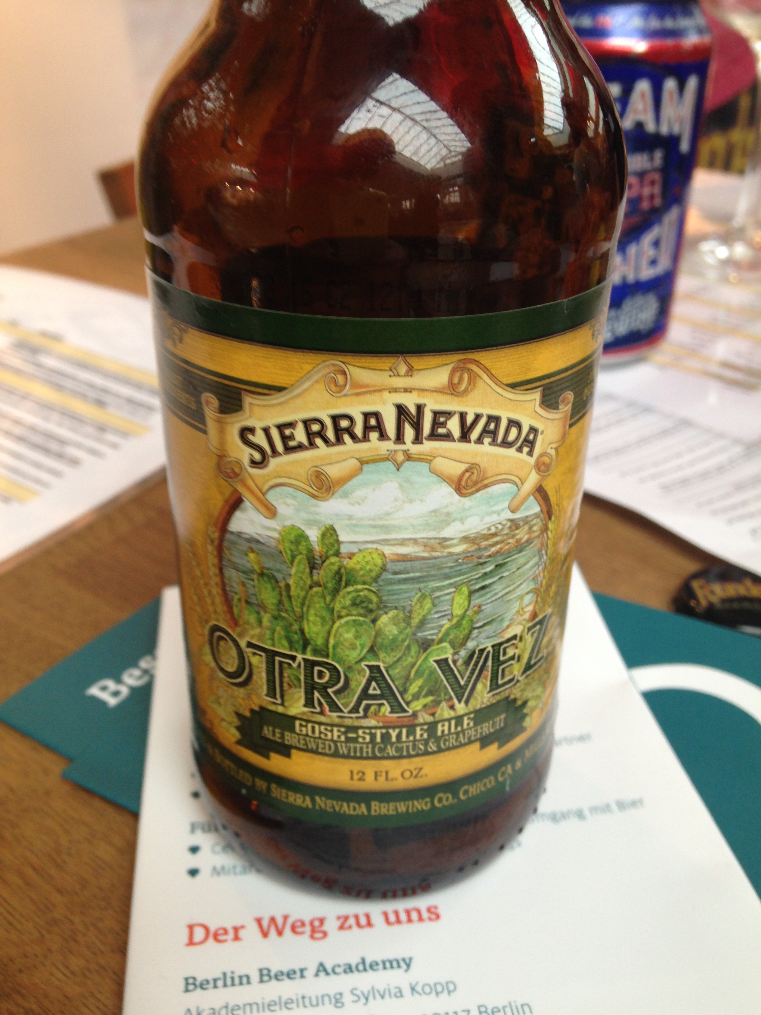 Braukunst live 2016 Gose-Style Ale "Otra Vez" der Sierra Nevada